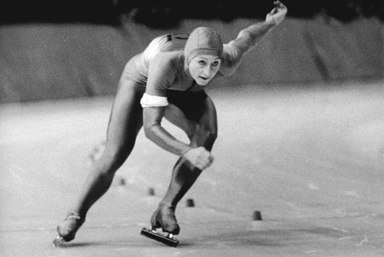 Christa Luding ADN-ZB Oberst 30.8.88-ms-Dresden: Olympia-Kandidatin Christa Luding-Seit 1973 ist die 28jährige Christa Luding auf dem Eisschnellaufoval aktiv. Die mehrfache DDR-Meisterin vom SC Einheit Dresden lief Weltrekorde über 500m (1981 und 1983), über 1000m (1981 und 1988) und im Sprint-Mehrkampf. Sie wurde Sprint-Weltmeisterin 1985 und 1988, Olympiasiegerin wurde sie 1984 (500m) und 1988 (1000m). Nun hofft sie erstmalig auf eine olympische Medaille im Bahnradsport. Siehe auch Motive 1-3N.